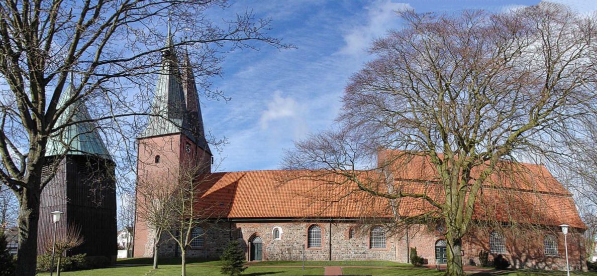 Ein Panorama der Kirche